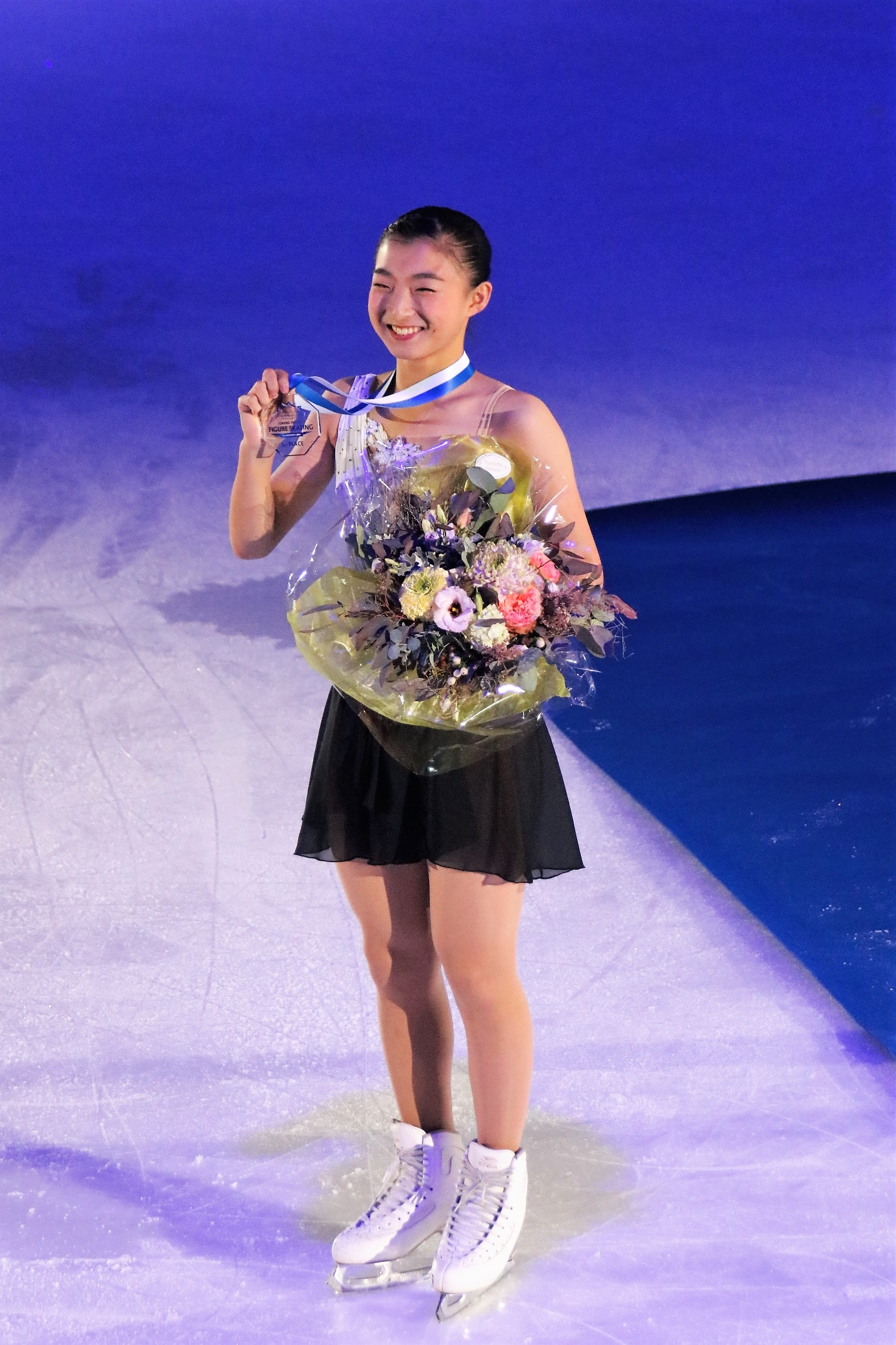 Каори Сакамото (Япония) на церемонии награждения Гран-при Хельсинки 2018.